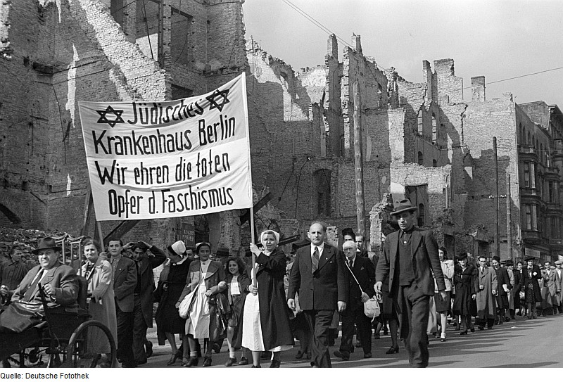 Original image description from the Deutsche Fotothek Ottomar Geschke spricht